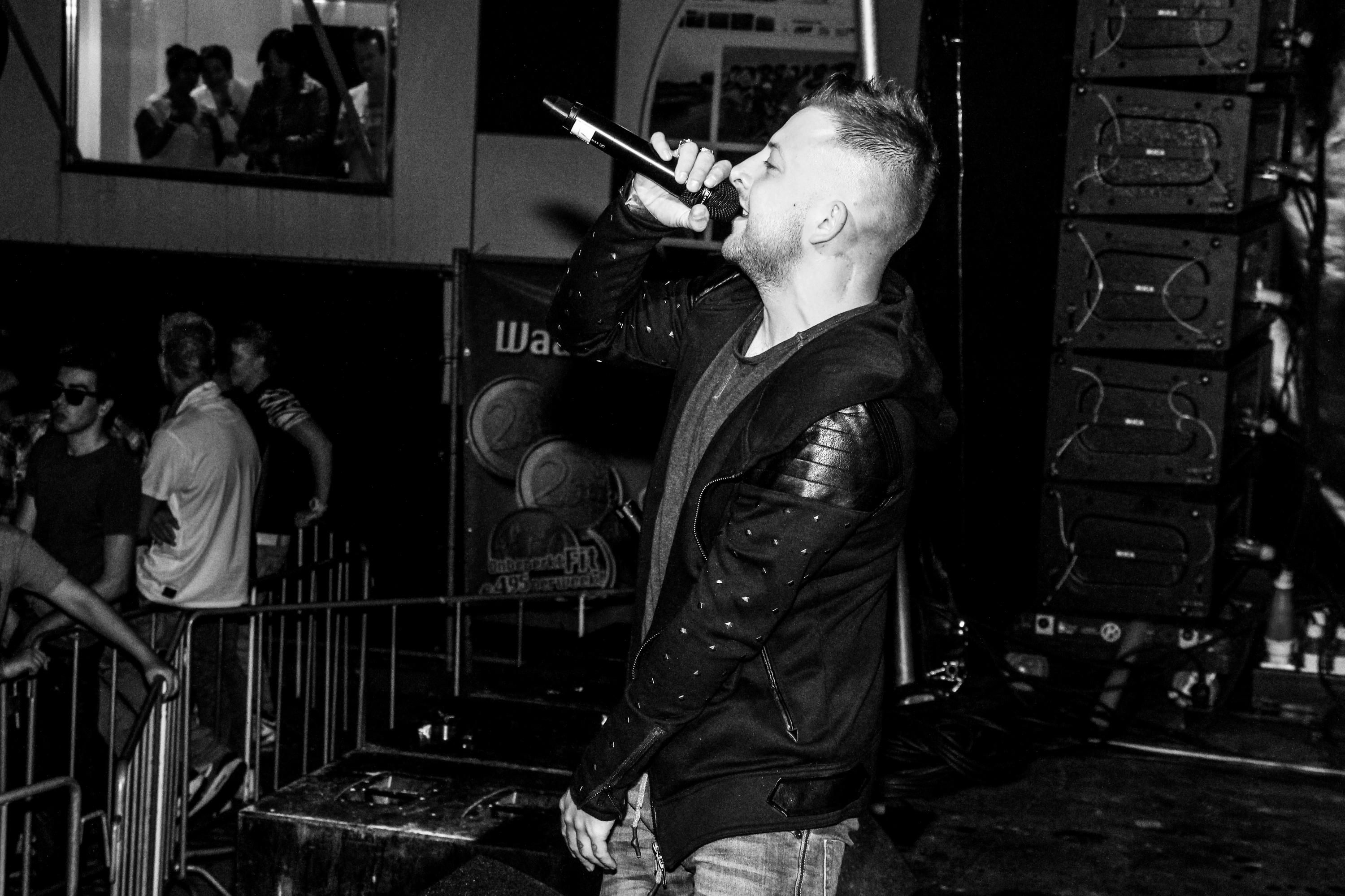 Rapper Mr. Polska tijdens Explosion Festival 2014 in Ommen